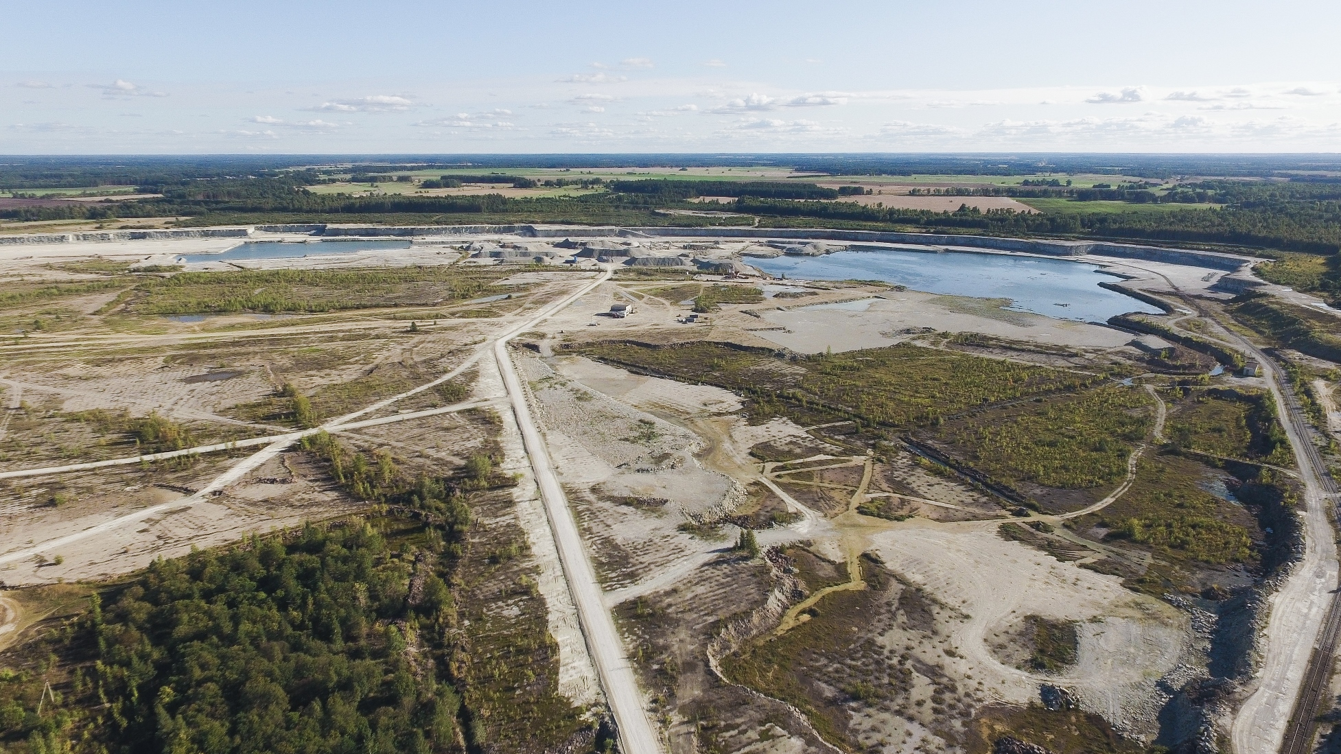 Aru-Lõuna lubjakivikarjäär